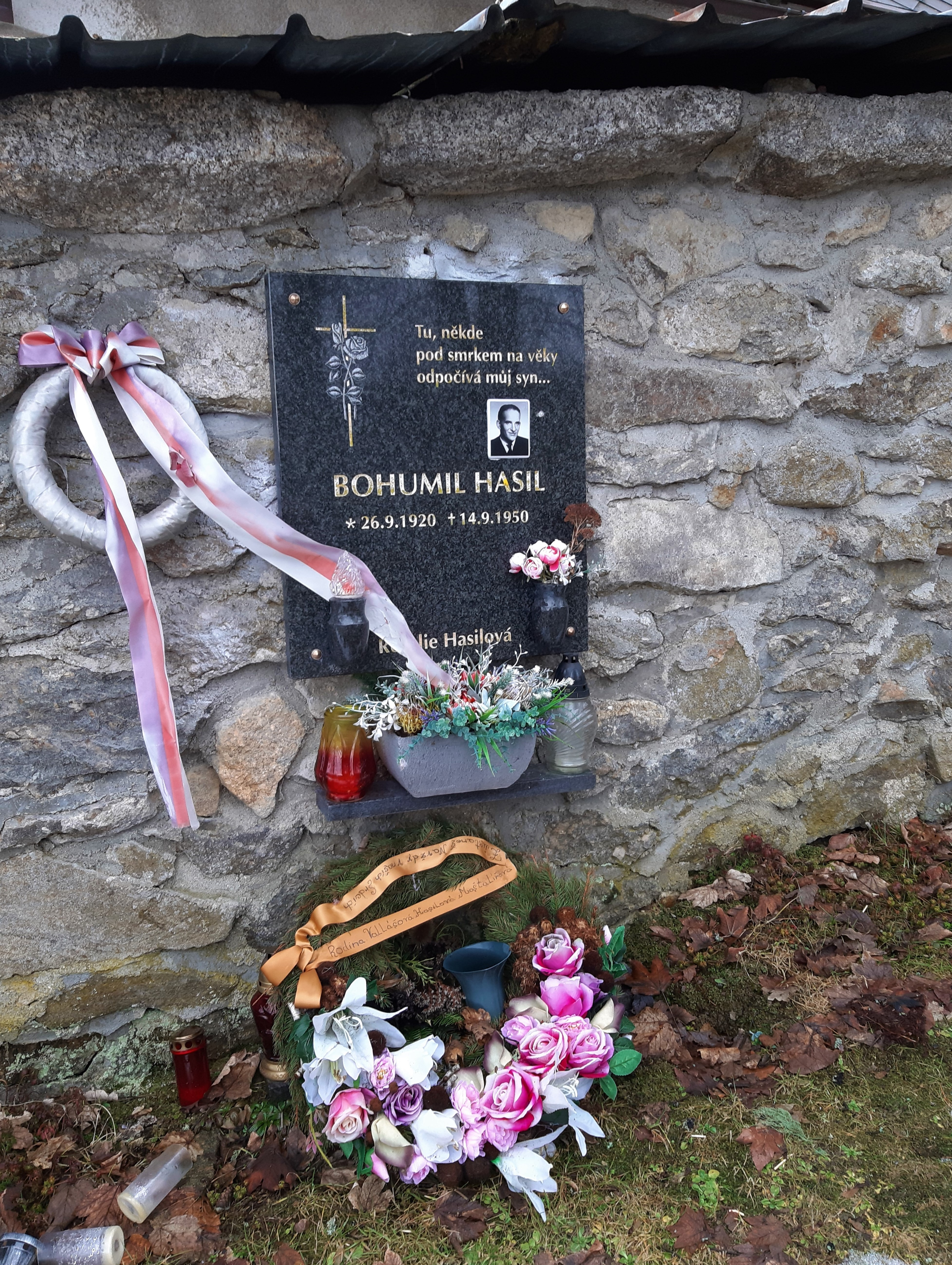 Kenotaf Bohumila Hasila (České Žleby)